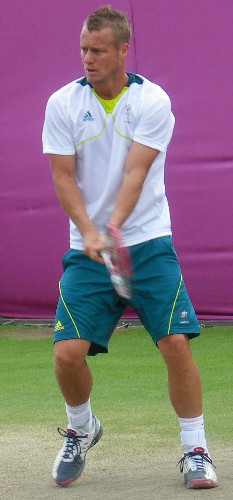 Lleyton Hewitt pendant un entraînement sur un court annexe de Wimbledon durant les Jeux olympiques de Londres 2012.